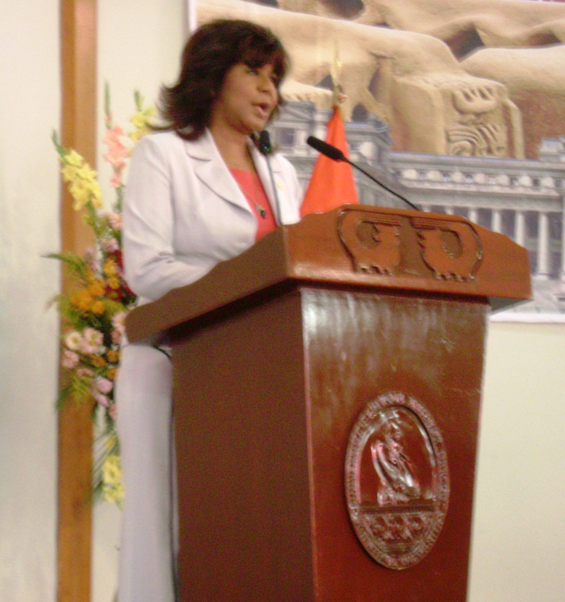 María Zavala Valladares, ministra de Justicia de la República del Perú, ofreciendo el discurso de clausura del Pimer Congreso Nacional de Magistrados, celebrado en la ciudad de Trujillo, Perú.